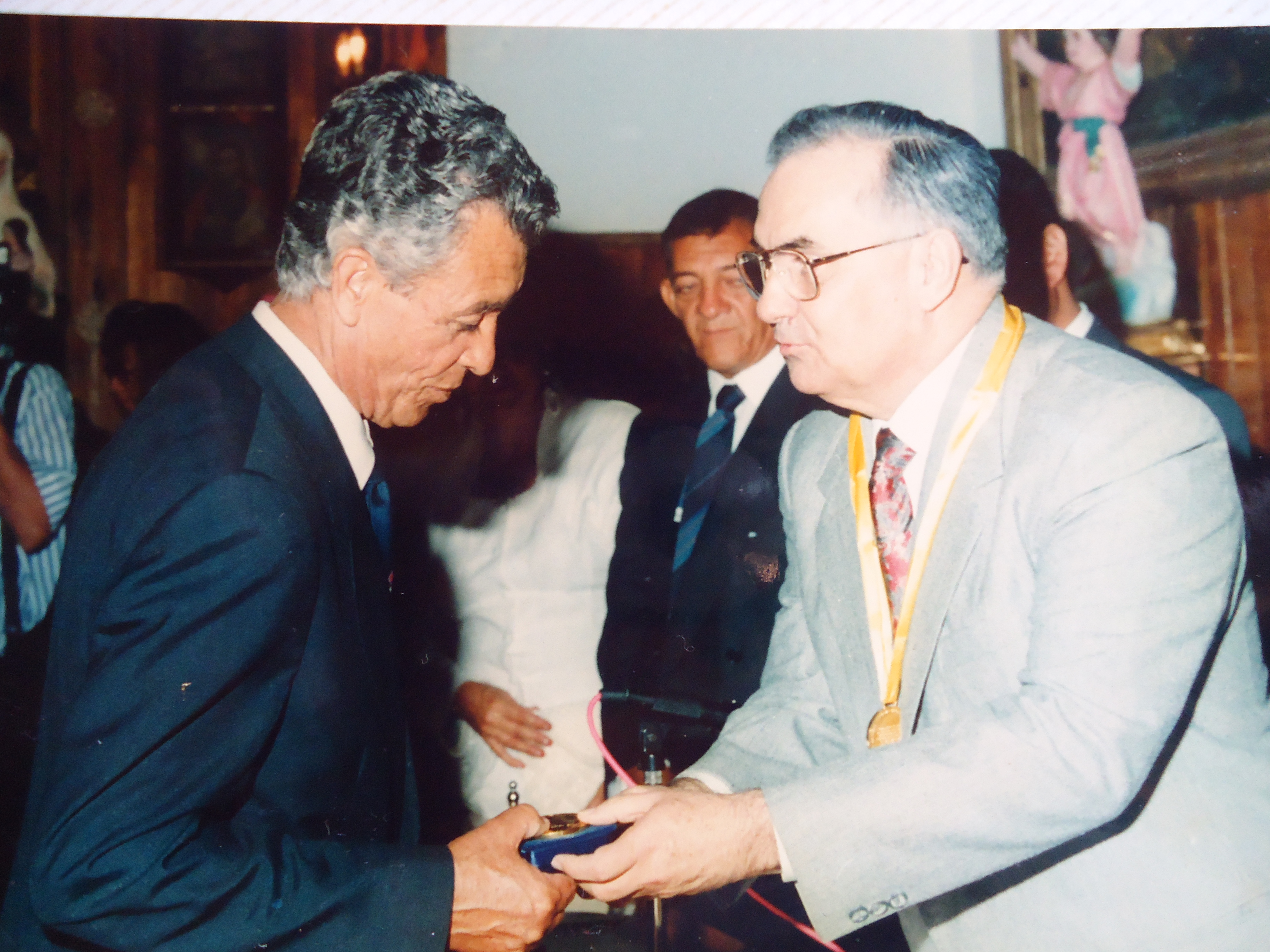 Condecoración Corte Suprema de Justicia el 27/11/1996